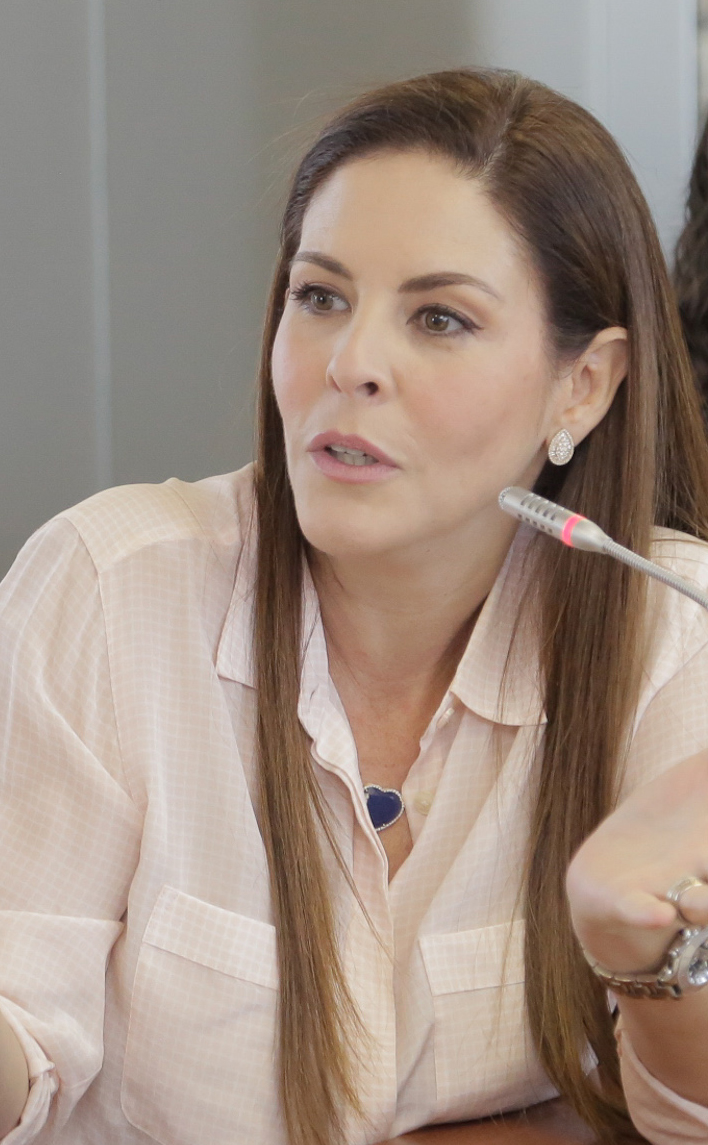 María Mercedes Cuesta en 2017.